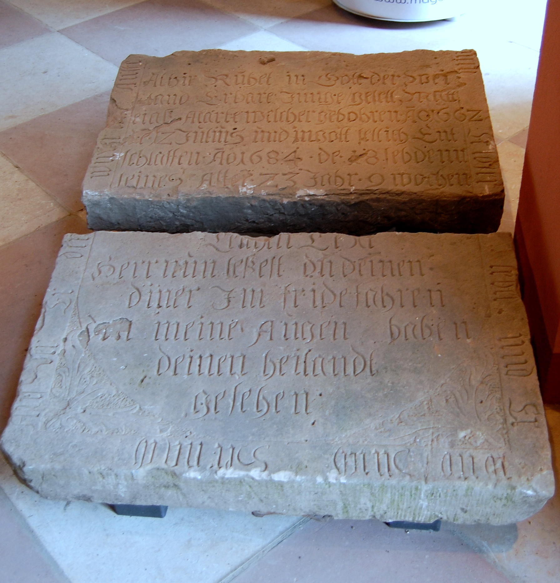 Grabstein aus Westerhüsen im Lapidarium St. Gertraud Salbke